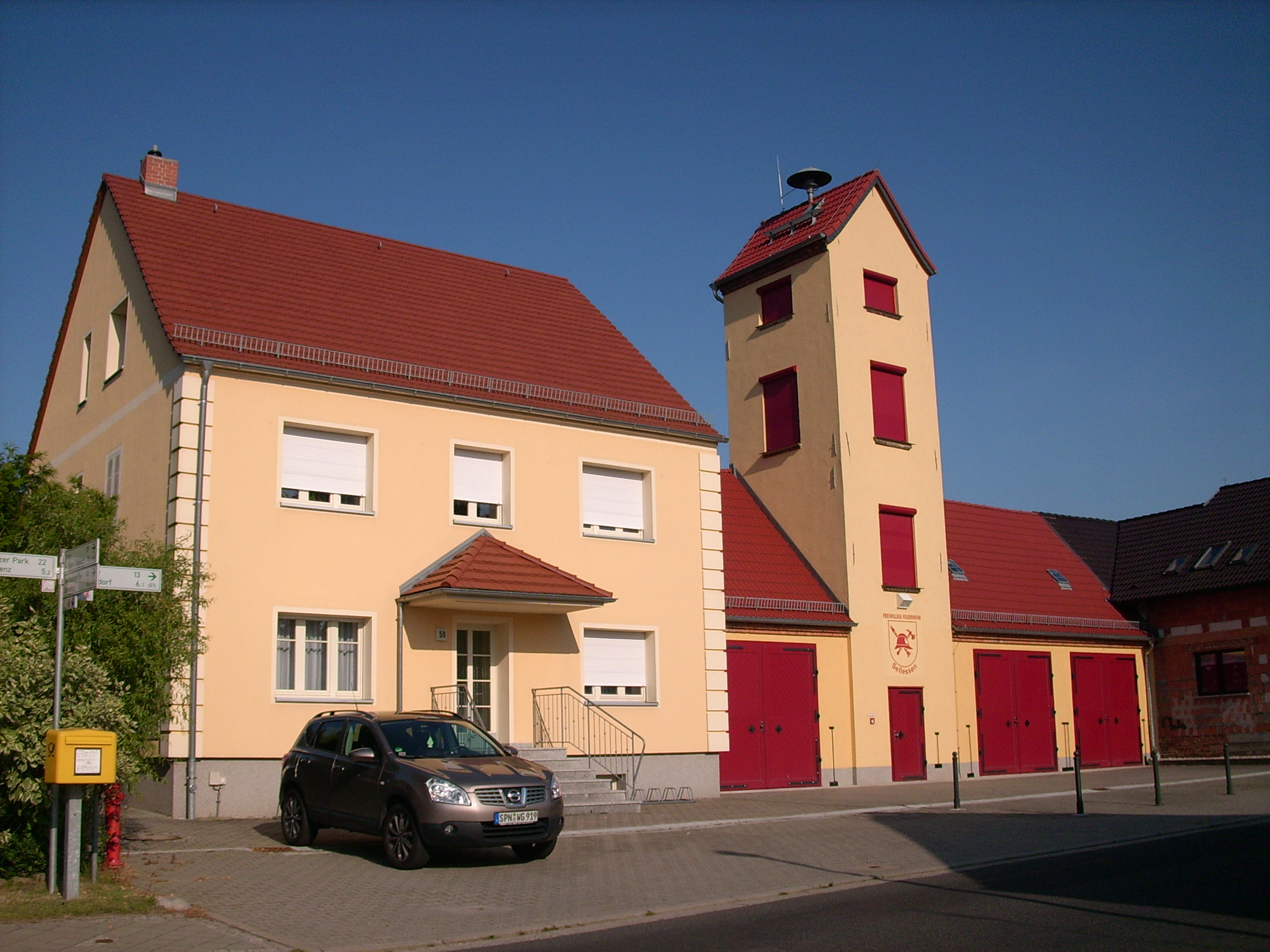 Freiwillige Feuerwehr in Sellessen, Ortsteil von Spremberg